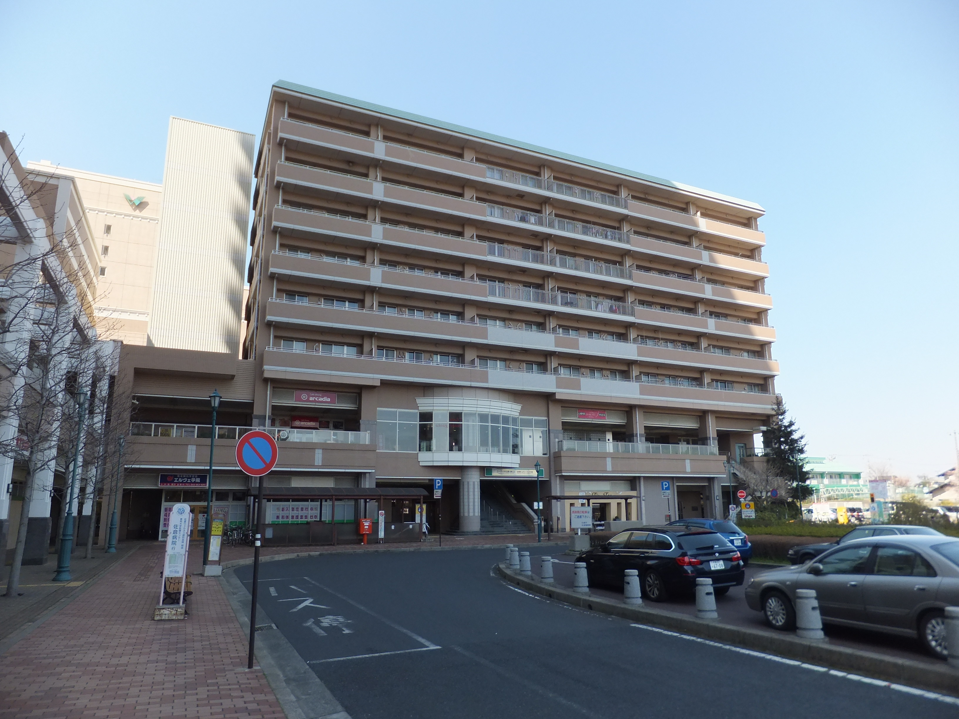 京成電鉄ユーカリが丘駅南口